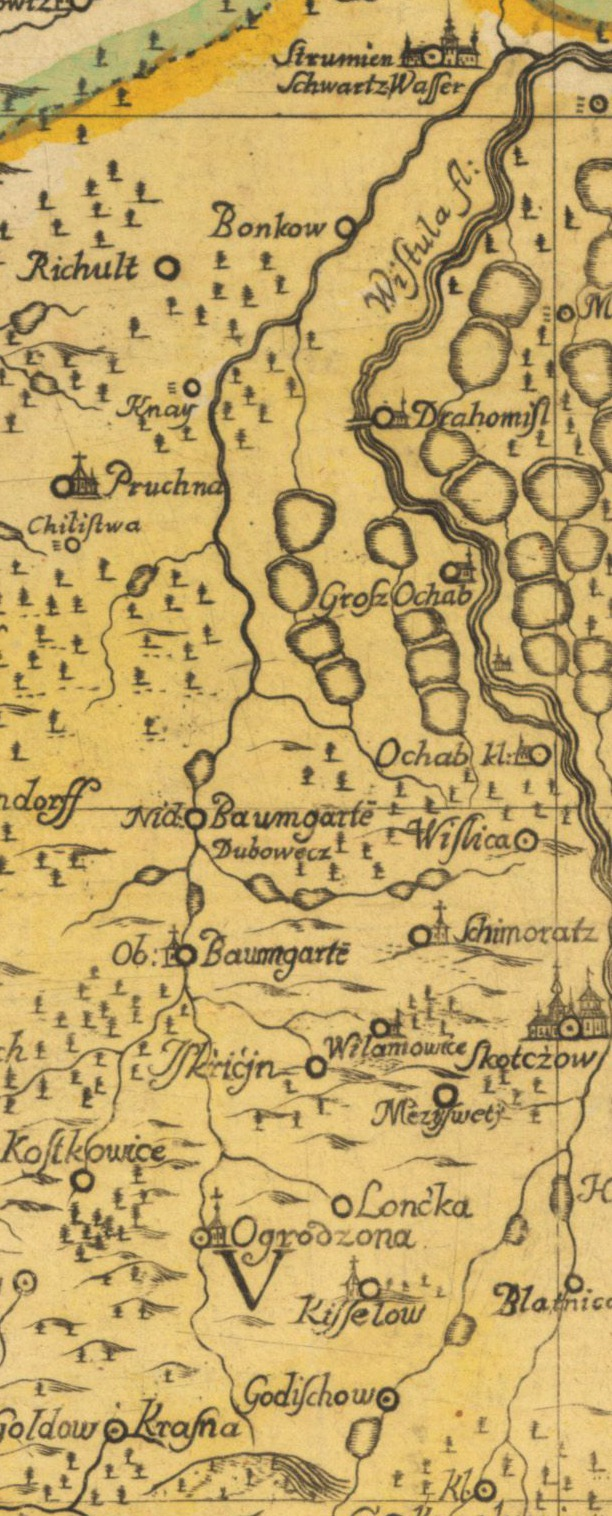 Knajka na mapie Jonasa Nigrinus z 1724